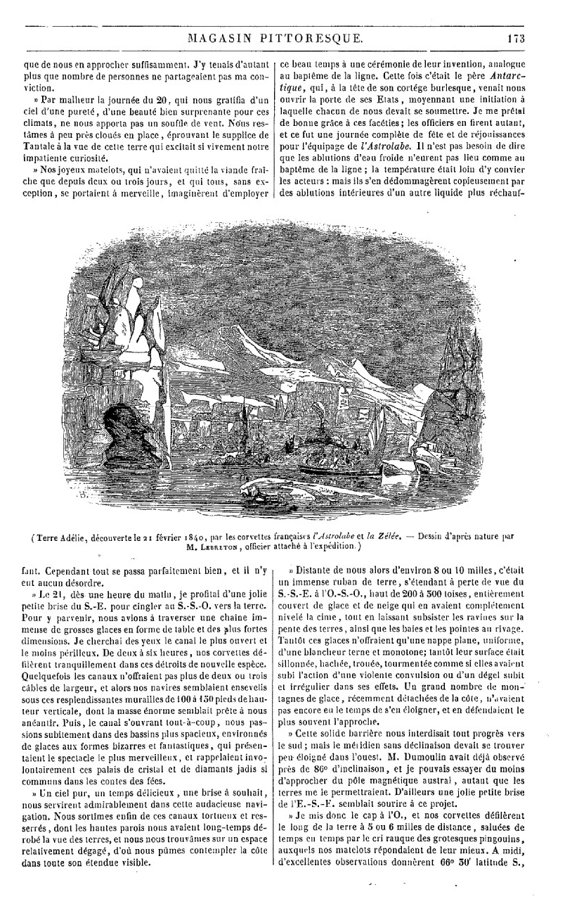 Jules Dumont d'Urville, Découvertes de 1838 et 1840, Le Magasin pittoresque, 1842, page 173. Illustration de Louis Le Breton.